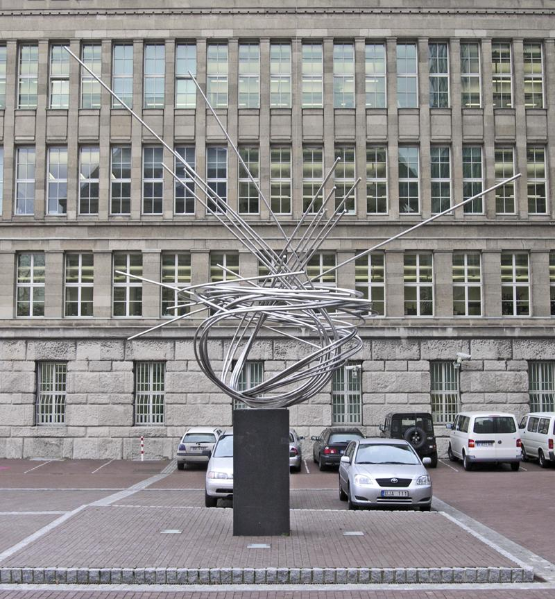 Norbert Kricke: Skulpur Grosse Mannesmann von 1960 in Dusseldorf Url